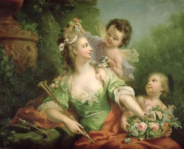 ? × ? cm